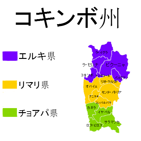 コキンボのIV地域は行政、政治、チリ分割された15地域の一つです。